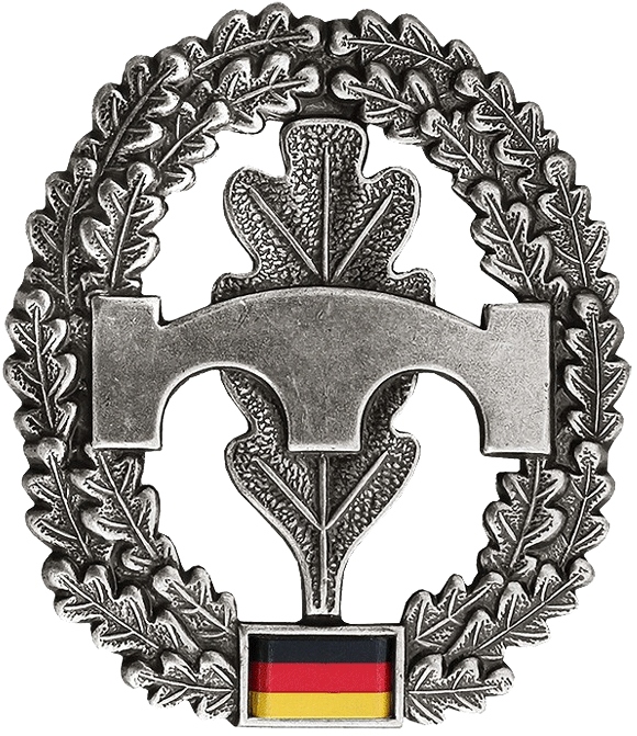 Barettabzeichen der Pioniertruppe der Bundeswehr Barettfarbe: Korallenrot Maße: Hoch: 53mm Breit: 46mm Ausführung: altsilber, Metall